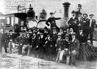 Foto da despedida do Rio Team após as duas partidas contra os paulistas